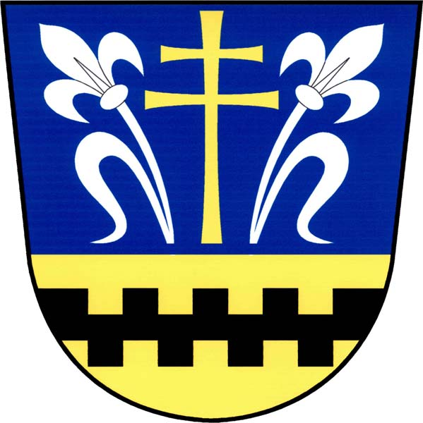 Znak obce Crhov